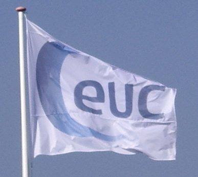 EUC Nordvests flag